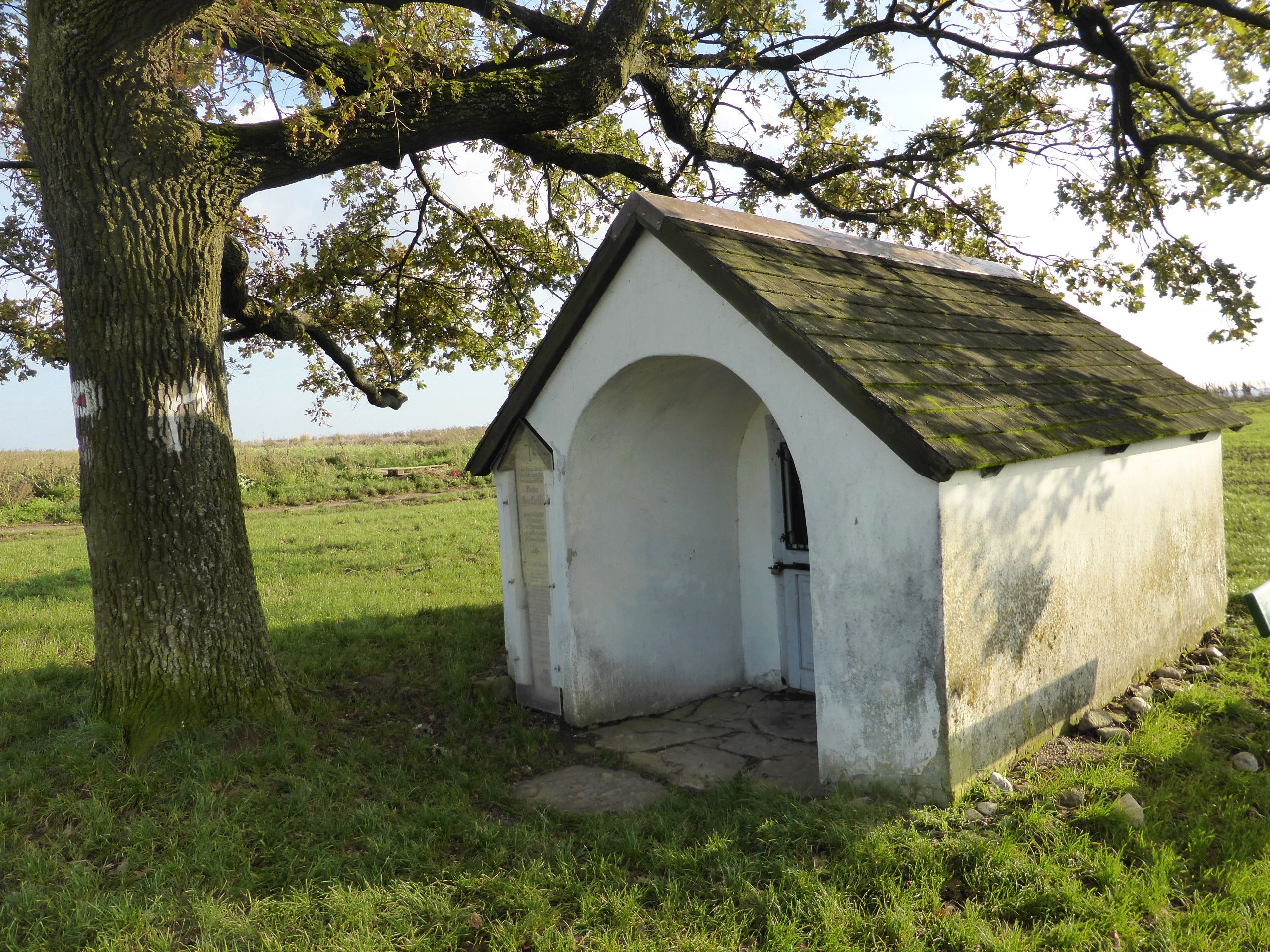 Watzlik-Kapelle (Pettendorf)